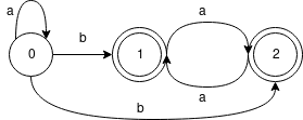 NFA for regex "a*ba*"